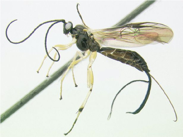 Earinus sp.